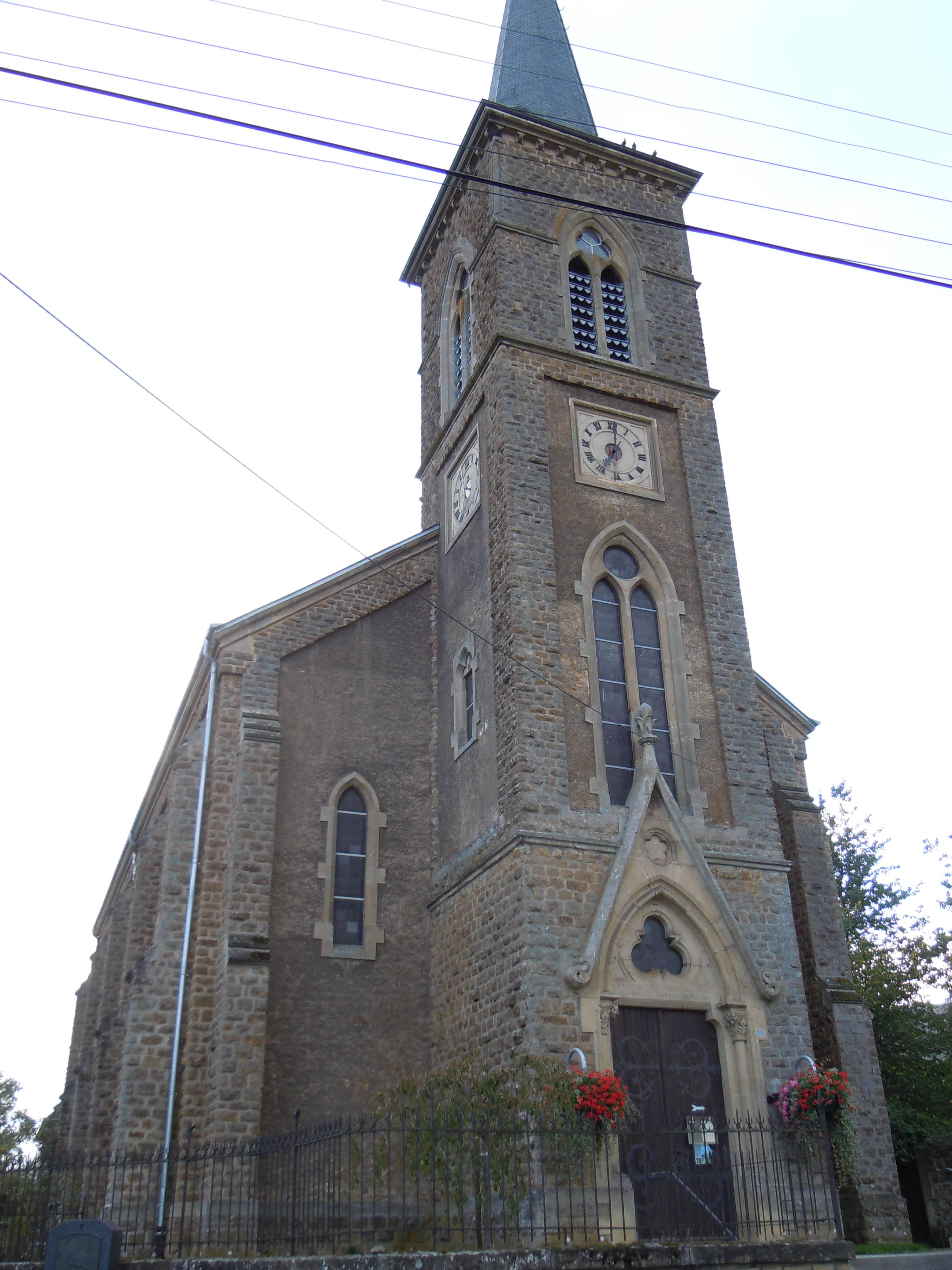 L'église Saint-Remacle dans le village belge de Hondelange